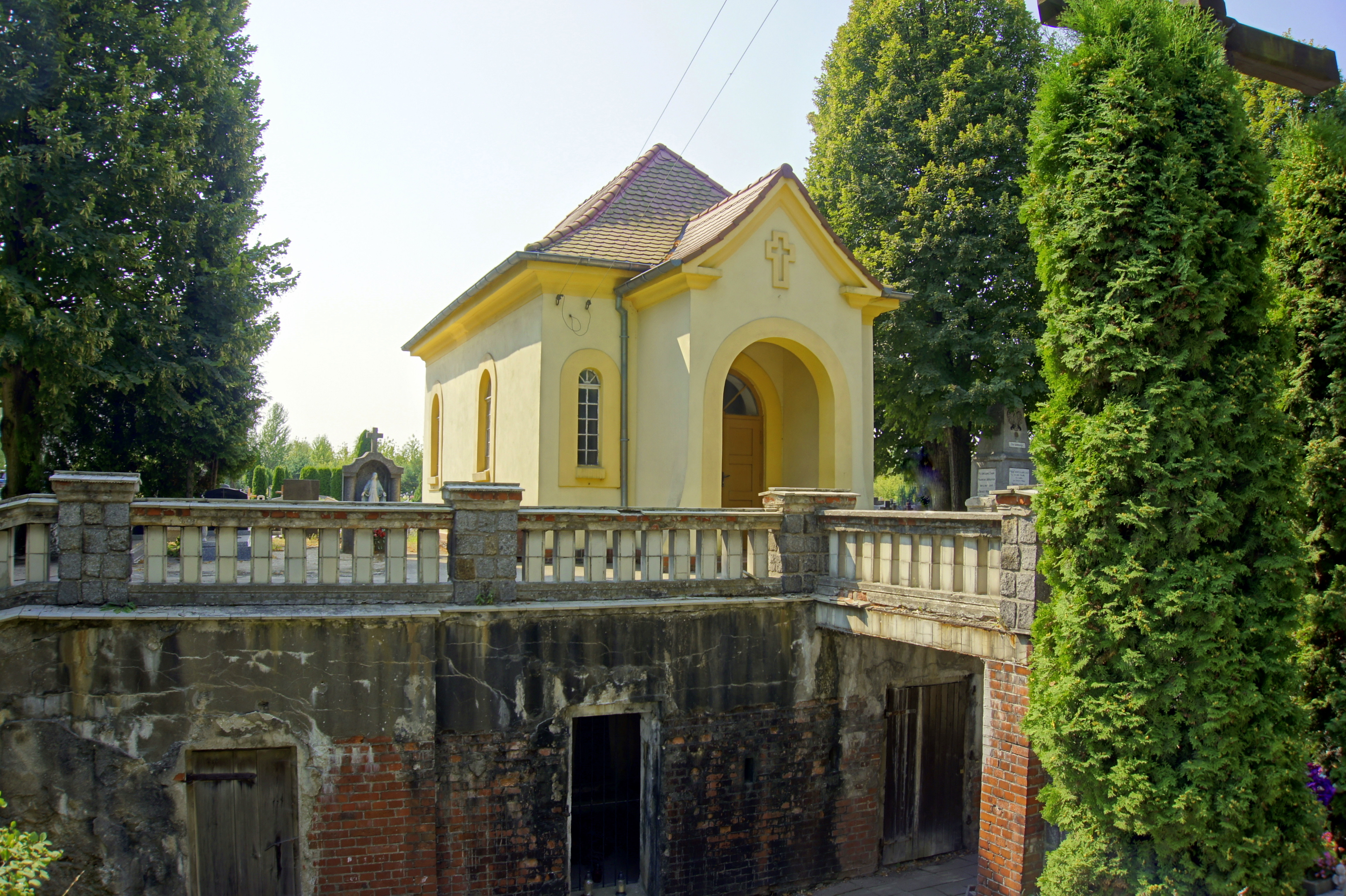 Poznań, osiedle Starołęka. Kaplica na cmentarzu parafialnym św. Antoniego Padewskiego. Została zbudowana w 1945 r. na schronie fortyfikacyjnym z 1914 r., związanym z Fortem I "Röder"